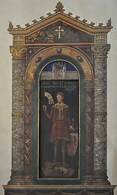 Markrabě Gerou